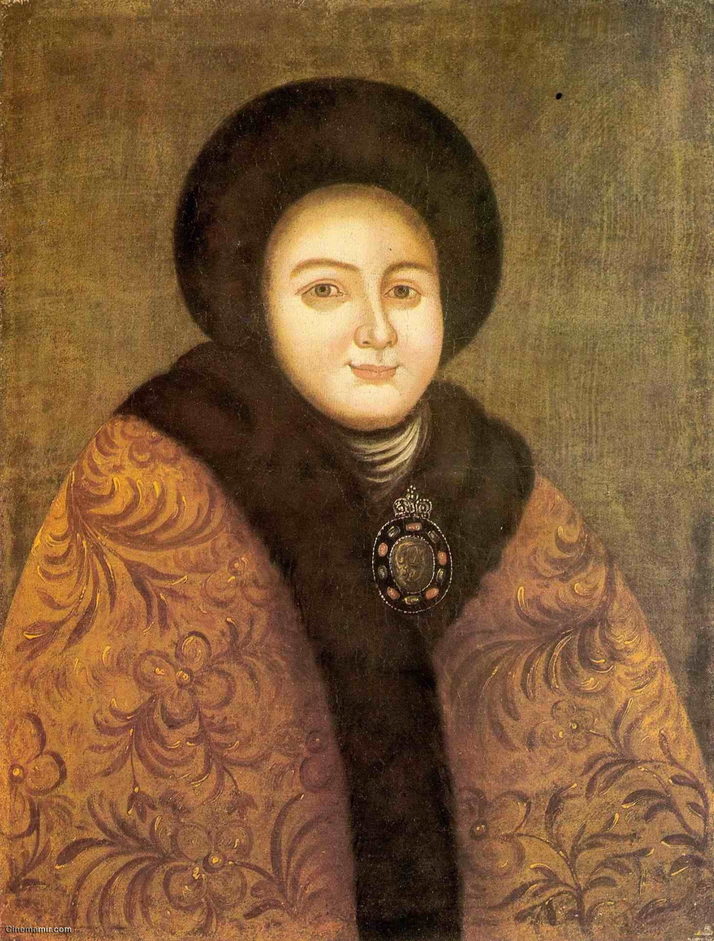 Eudoxia Lopukhina Неизвестный художник Портрет царицы Евдокии Фёдоровны, урожд. Лопухиной XVIII в. (?) Холст, масло. Чухломской краеведческий музей им. А. Ф. Писемского